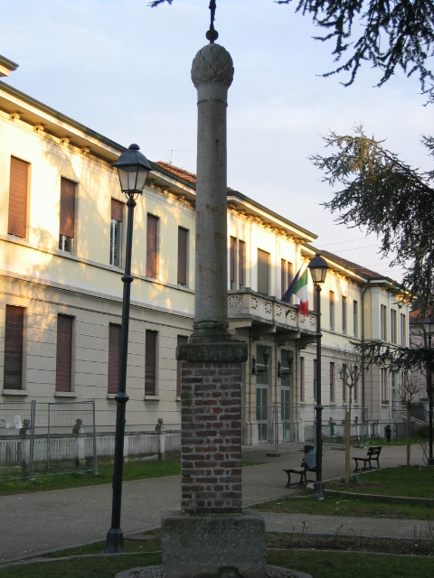 Colonnina votiva Viale Lombardia, angolo Via Vittorio Veneto